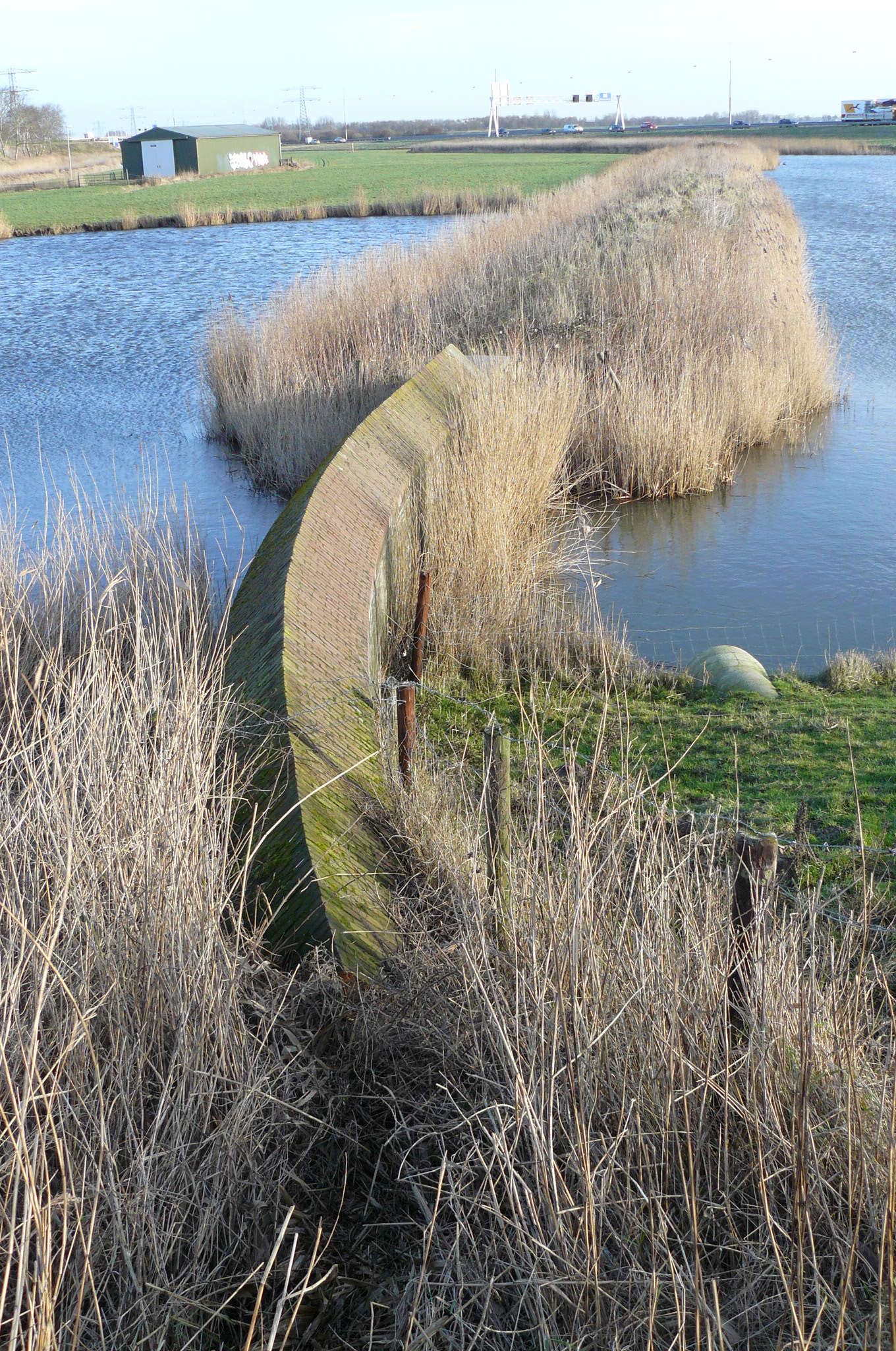 Stenen beer van de inundatiesluis in de St. Aagtendijk. Tussen 1894 en 1897 werd in de St. Aagtendijk een inundatiesluis gebouwd ten noorden van het fort. Via deze sluis kon met het water vanuit het Noordzeekanaal de westzijde van de St. Aagtendijk onder water worden gezet. De stenen keer had de taak twee watergebieden te scheiden. Aan de linkerzijde werd het gebied onder water gezet en aan de rechterzijde werd het kanaal voor de St. Aagtendijk gevoed. De sluis is inmiddels gesloopt maar de stenen beer is gebleven.